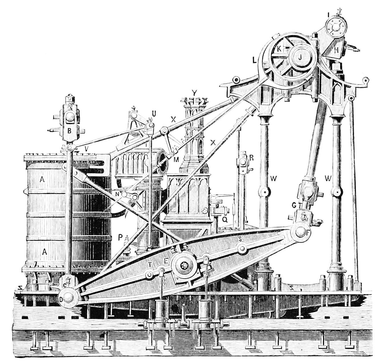 The side lever engine